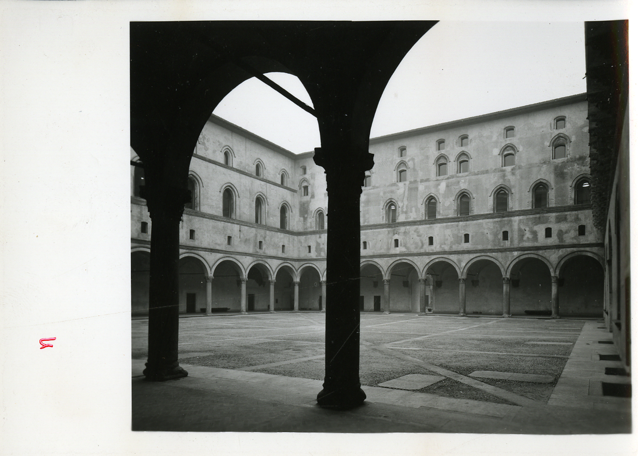 Servizio fotografico : Milano, 1963 / Paolo Monti. - Fototipi: 2 : Positivo b/n, gelatina bromuro d'argento/ carta, provino a contatto da pellicola 10x12. - ((Serie costituita da 2 provini a contatto dei negativi identificati con i nn.: 7731, 7732. - Confronta scheda G07728-7735. - La suddetta serie è contenuta nella scatola dei contatti identificata con il n.144; sul coperchio iscrizione didascalica manoscritta a pennarello nero: "Contatti 7c". - Occasione: Documentazione del riordino e sistemazione dei Musei del Castello e delle nuove sale. - Fonte: Agenda di Paolo Monti: R 1 - Monti/ 1 aprile 1963 - 6 giugno 1964/ 6000-8193 (1963-1964), presso Archivio Paolo Monti